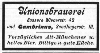 Reklame der Unionsbrauerei Schülein & Cie. in der Münchener Ratsch-Kathl Nr. 95 vom 3. Dezember 1904